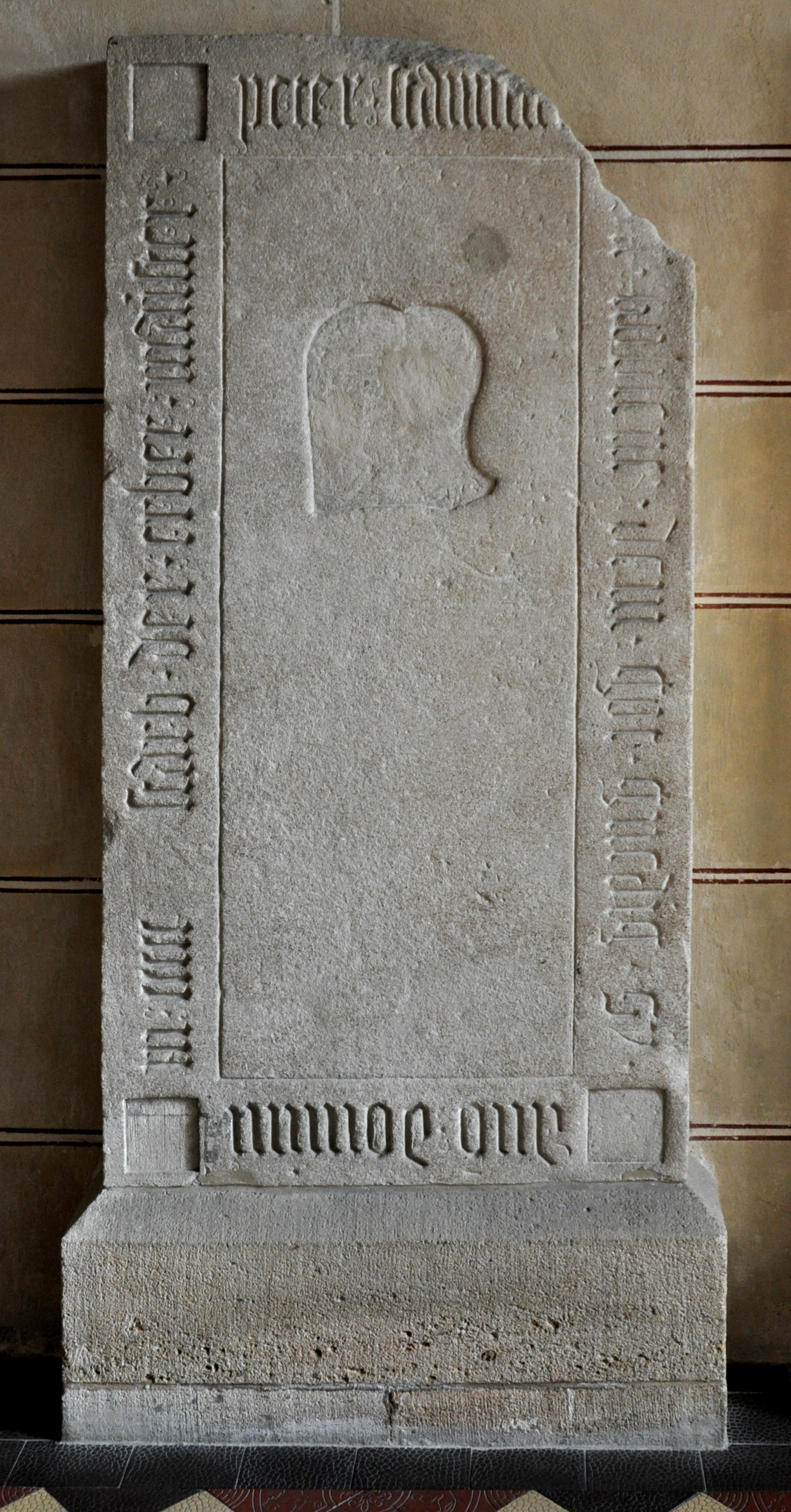 Bad Urach, Stiftskirche St. Amandus, Grabplatte des Peter von Koblenz, Baumeister der Kirche, † 16. November 1501 (Todesdatum urkundlich überliefert); Inschrift: an[n]o domini m ccccc … starb der erber maister peter stainme[cz] [v]on koblencz dem got gnedig sy